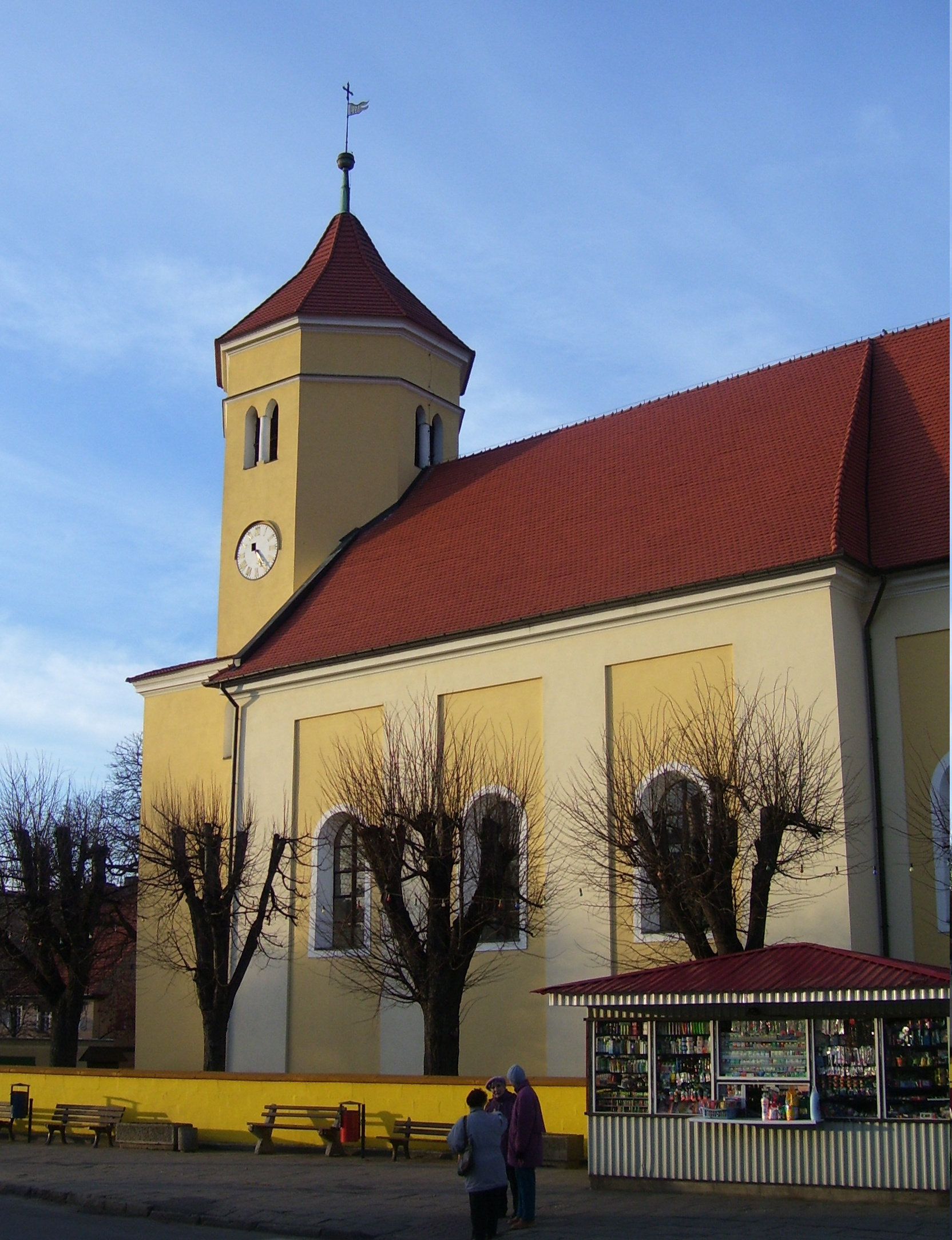 Przemków, kościół pw. Najświętszej Marii Panny.